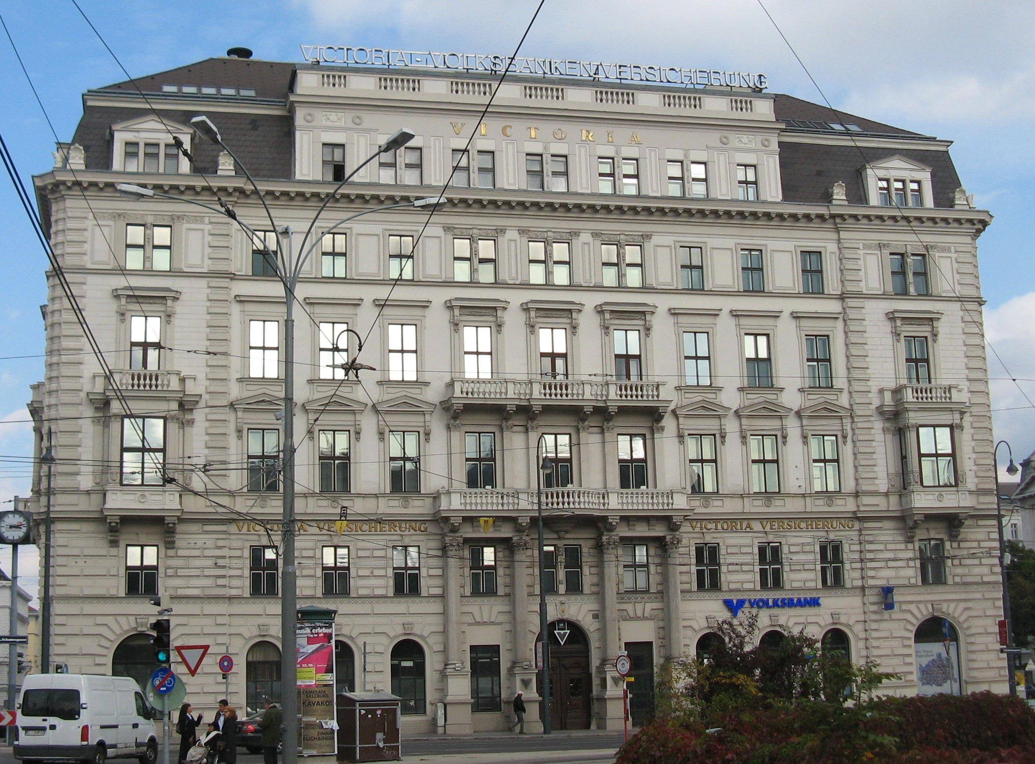 Haus (1870) von Anton Ölzelt, Schottengasse 11, Wien-Innere Stadt